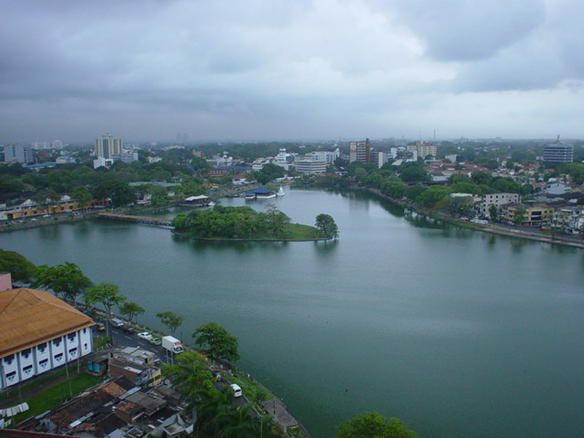 Beira Lake, Colombo